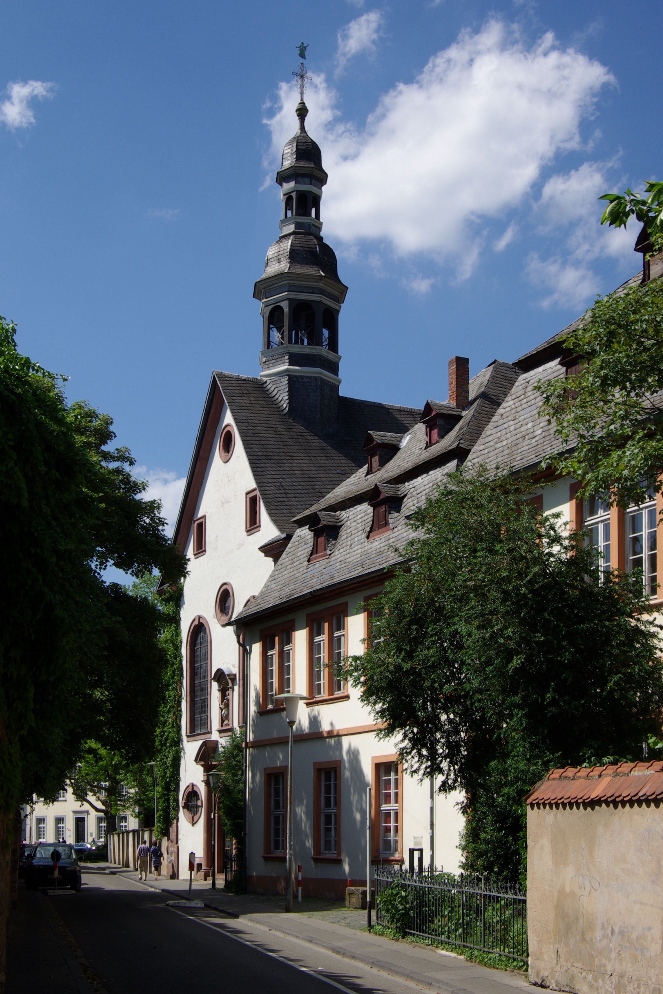 Trier, Flanderstraße 2, Sichelstraße 19: ehemaliges Welschnonnenkloster, heute unter anderem Auguste-Viktoria-Gymnasium und Staatliches Studienseminar; ehemalige Klosterkirche: hochbarocker Saalbau mit Dachreiter, 1714–36 (Weihe), Architekt Nicolaus Minden, Erneuerung um 1730, Architekt Frater Joseph Walter; Ausstattung; Kloster: Dreiflügelanlage mit Mansarddächern, 1728-34, Architekt Frater Joseph Walter; vorbarocke und barocke Keller; zwei neubarocke Torbögen, 1906, Architekt Hermann Fülles